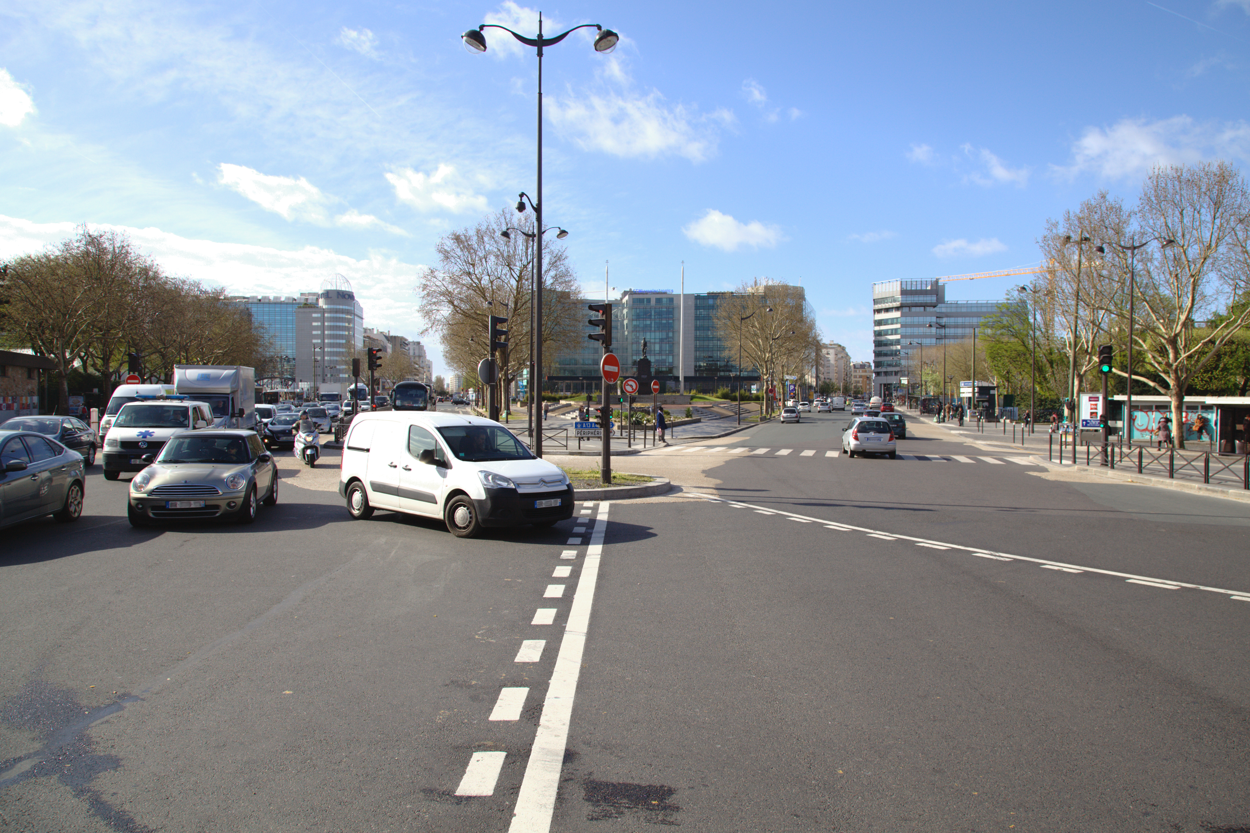 Vue depuis la porte d'Orléans de Paris en direction banlieue. À gauche l'avenue de la porte d'Orléans (prolongée par l'ancienne route nationale N20), à droite la rue la légion étrangère (prolongée à Montrouge par l'avenue Henri Ginoux)